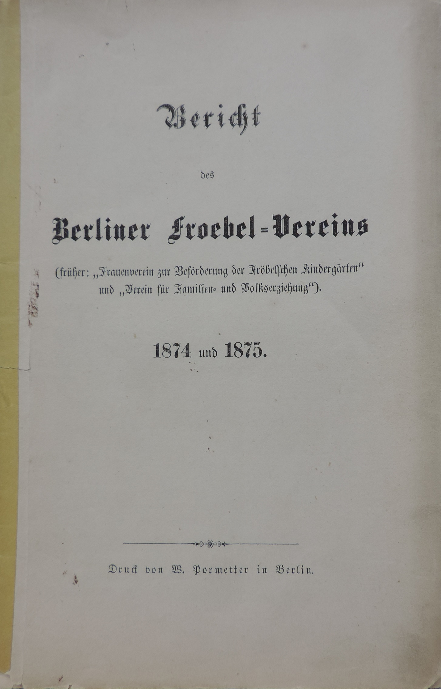 Bericht des Berliner Fröbel-Vereins 1874-1875